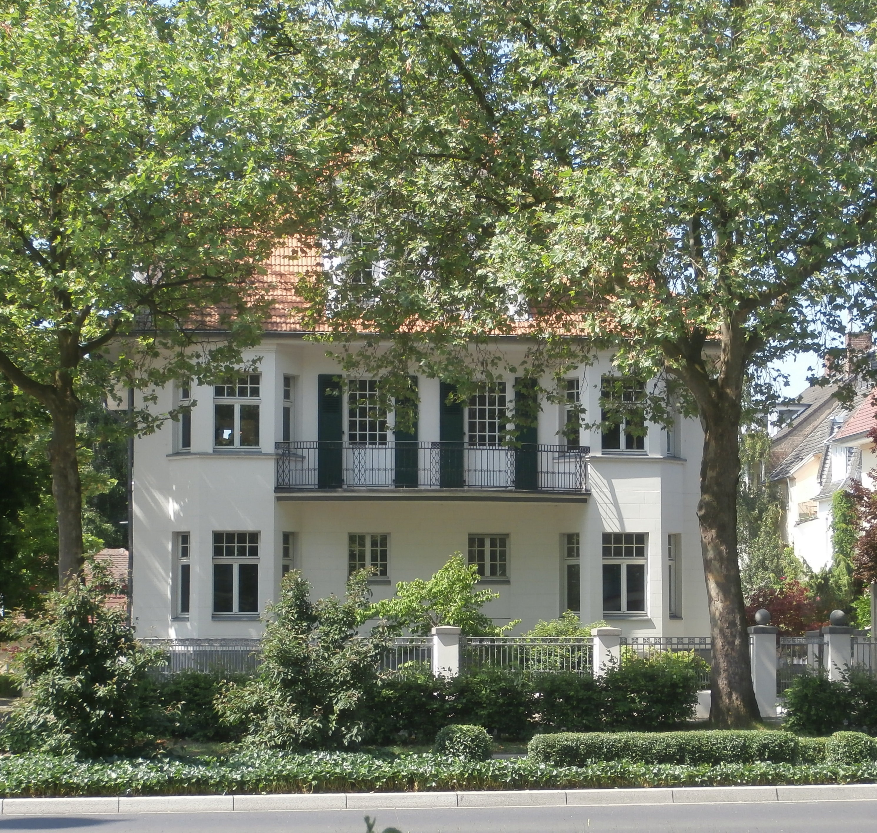 Denkmalgeschützte Villa, Willy-Brandt-Allee 18, Bonn-Gronau